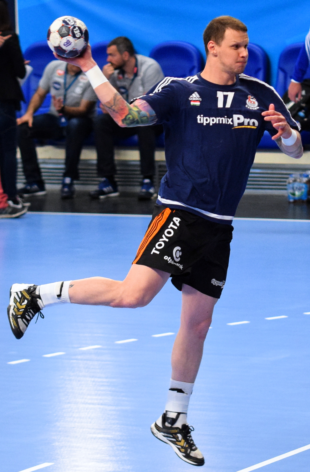 Rencontre de quart de finale de la ligue des champions 2016-17 entre le PSG et Pick Szeged. A Coubertin, le 29 avril 2017.